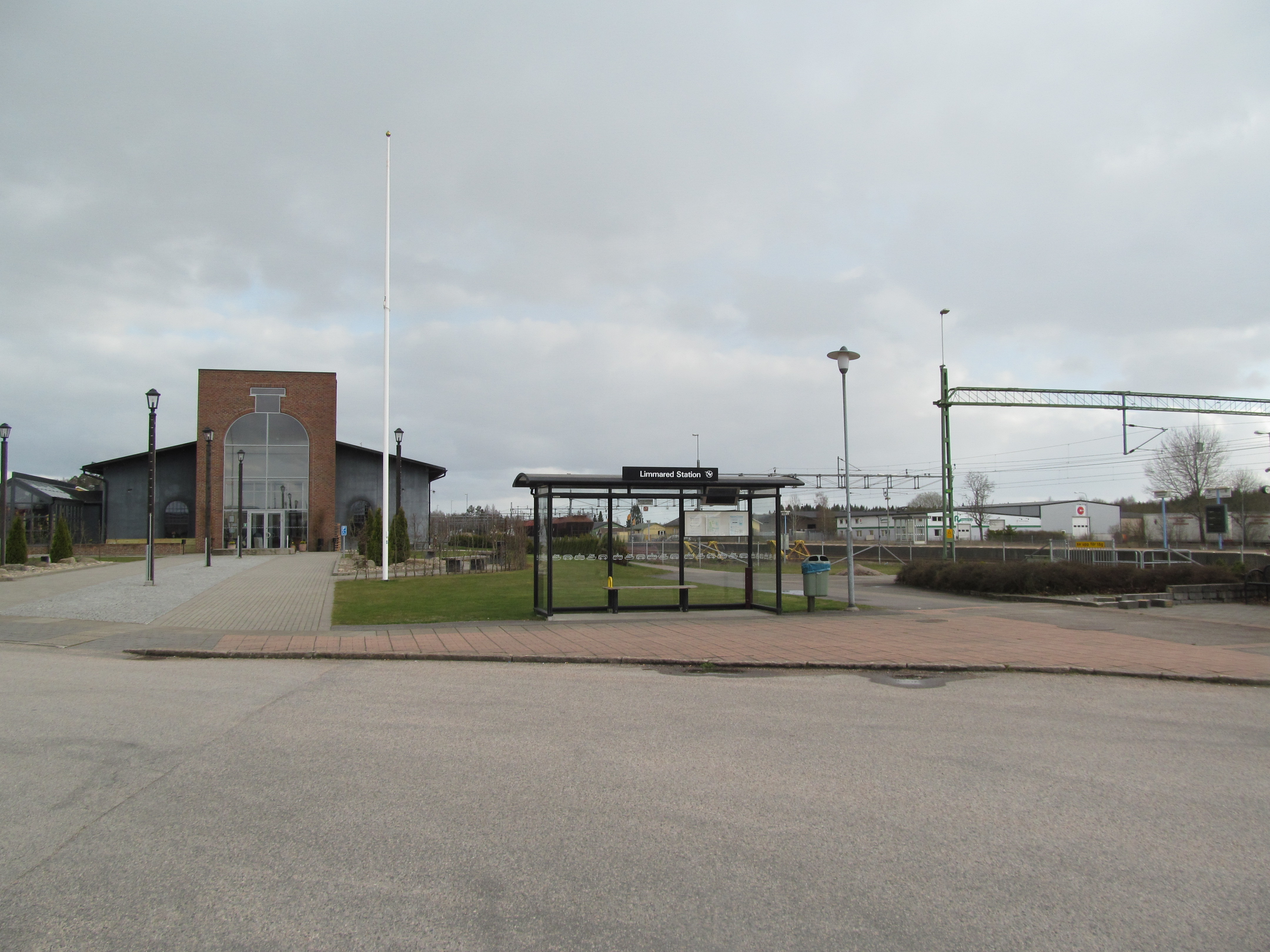 Glasets hus i Limmared sett från bussplan med järnvägen till höger i bild. Byggnaden fungerar även som vänthall för tåg och bussresenärer.